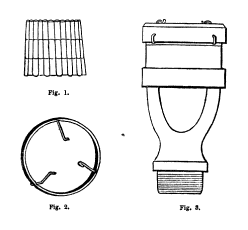 Bec de gaz à Narbonne - 1) mèche, 2) support, 3) couronne.